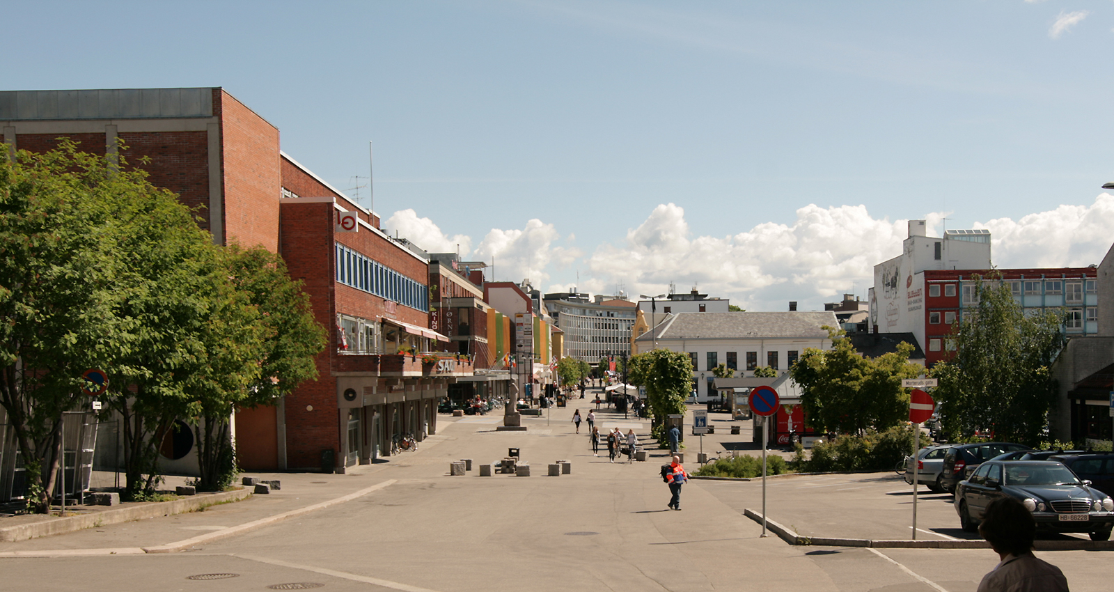 Torgata med Stortorget, Hamar.